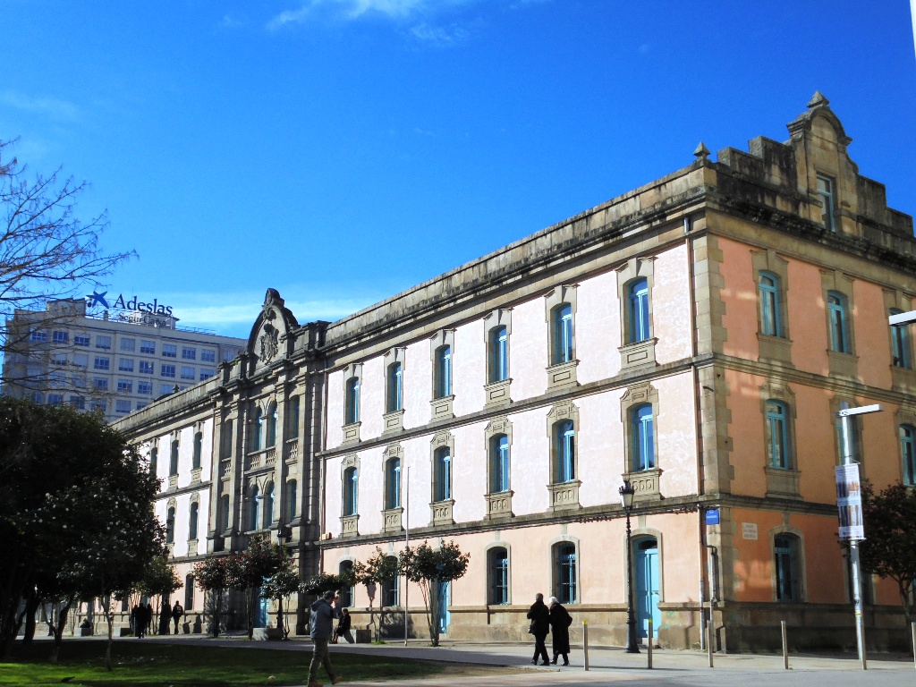 Facultad de Bellas Artes en Pontevedra Capital